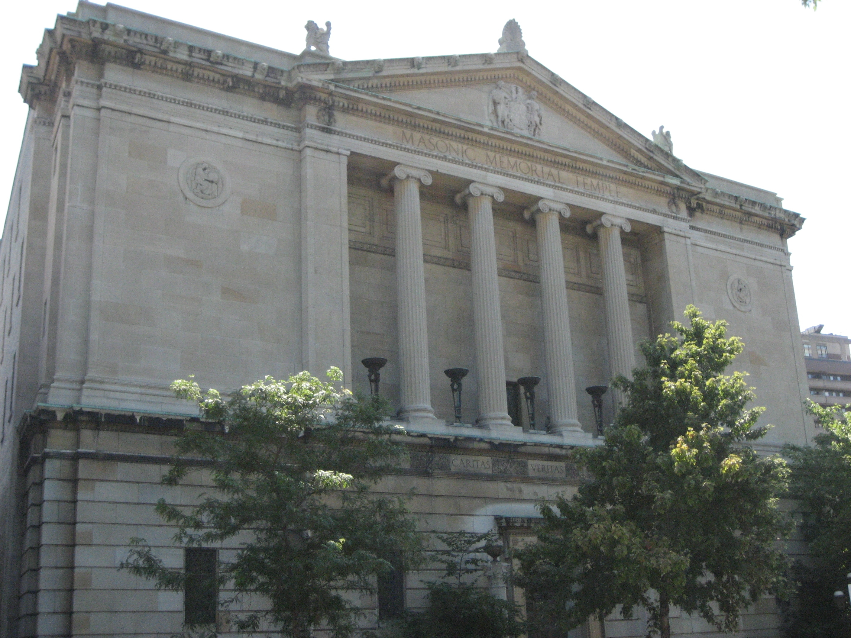 Le temple maçonnique de Montréal a pour nom Memorial Temple. Photo prise par Déclic.